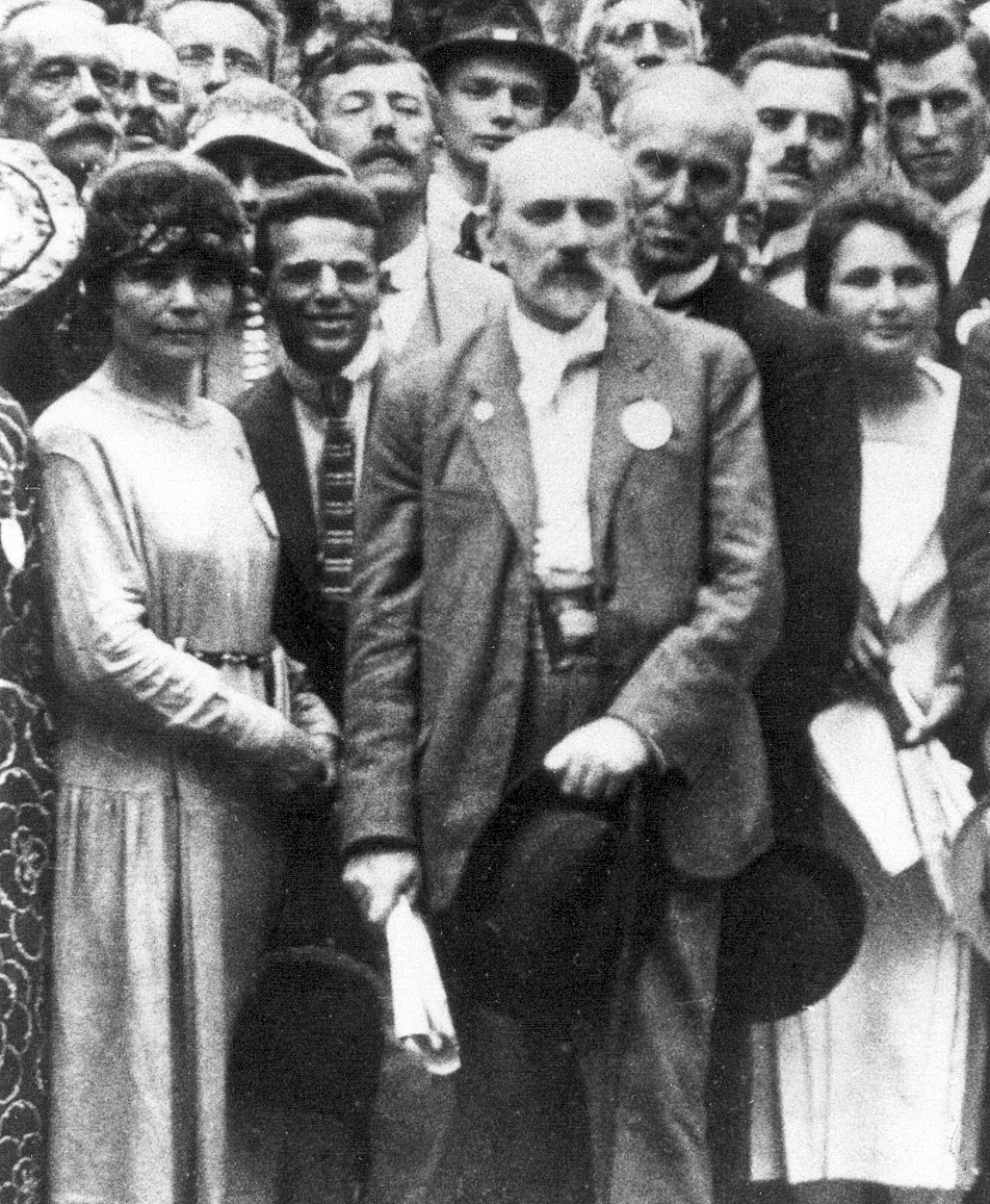 13. Esperanto-Weltkongress, Prag 1921. Teilnehmergruppe mit Leo Belmont im Vordergrund